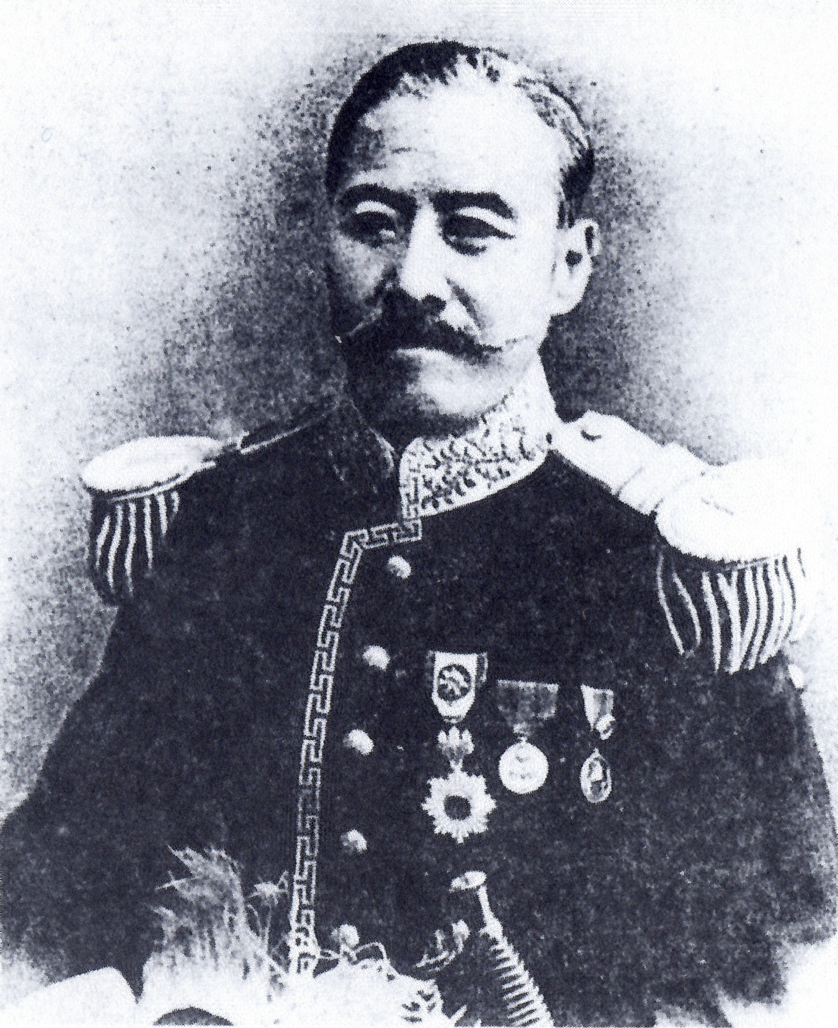 大関増勤の肖像。